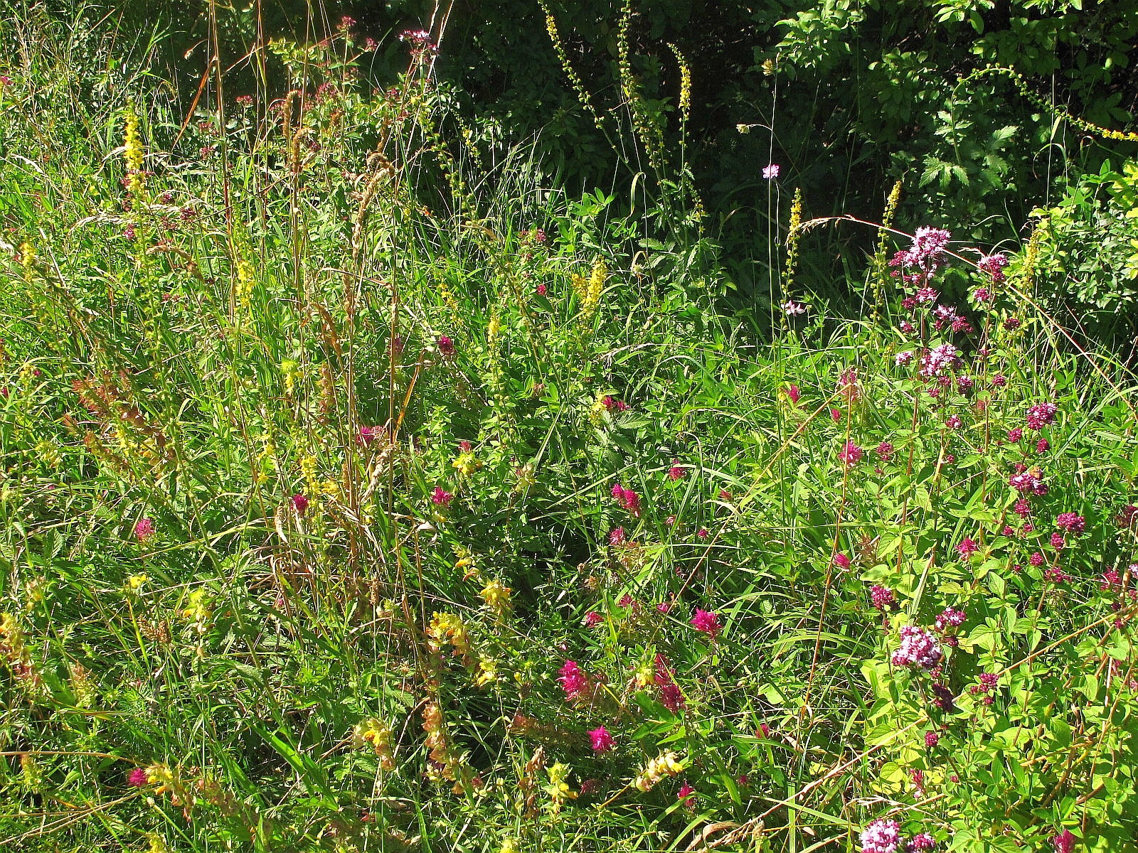 Schmetterlingswiese (Artengemeinschaft Halbtrockenrasen)